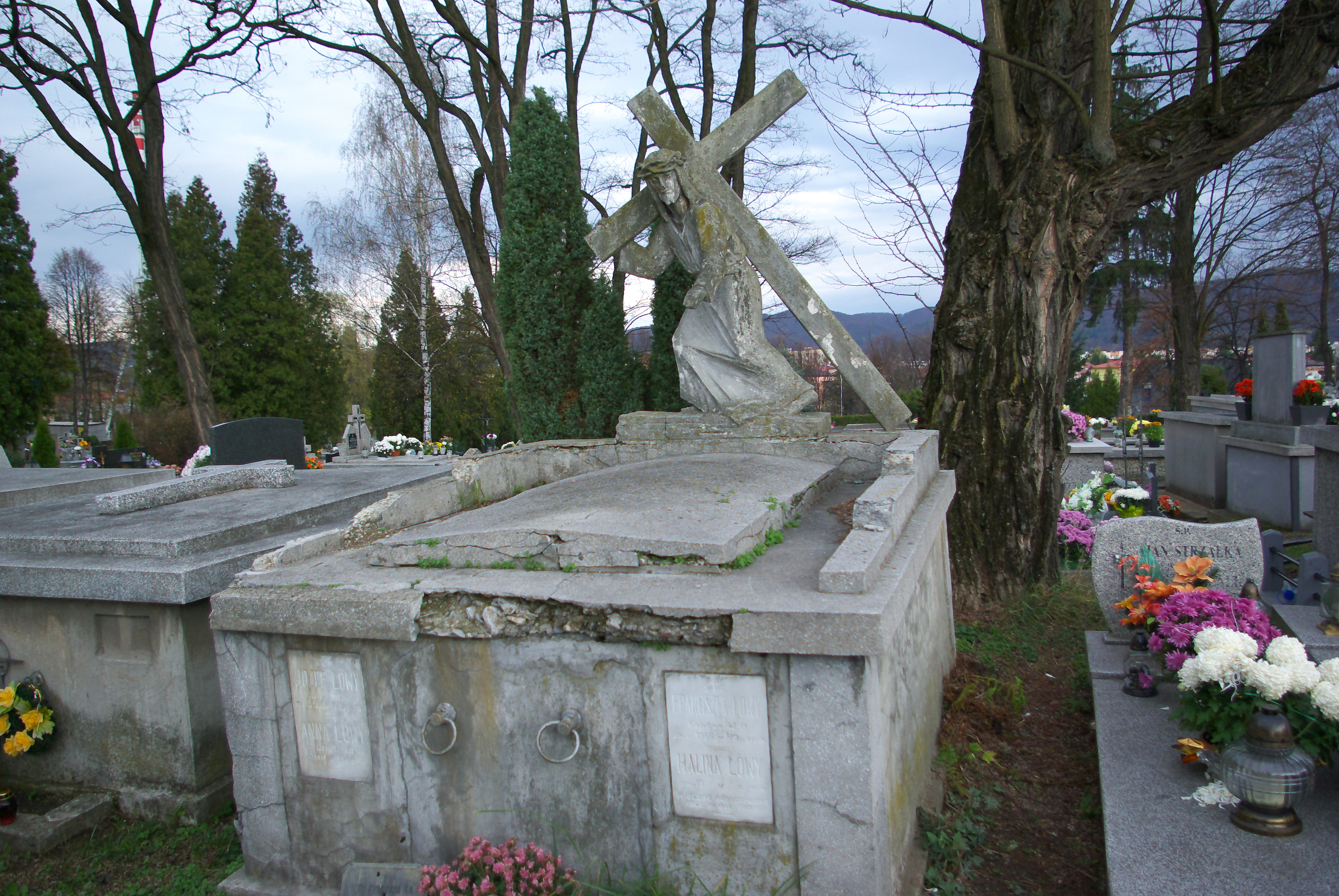 Grobowiec rodziny Löwy w części „Matejki Stary” Cmentarza Centralnego w Sanoku